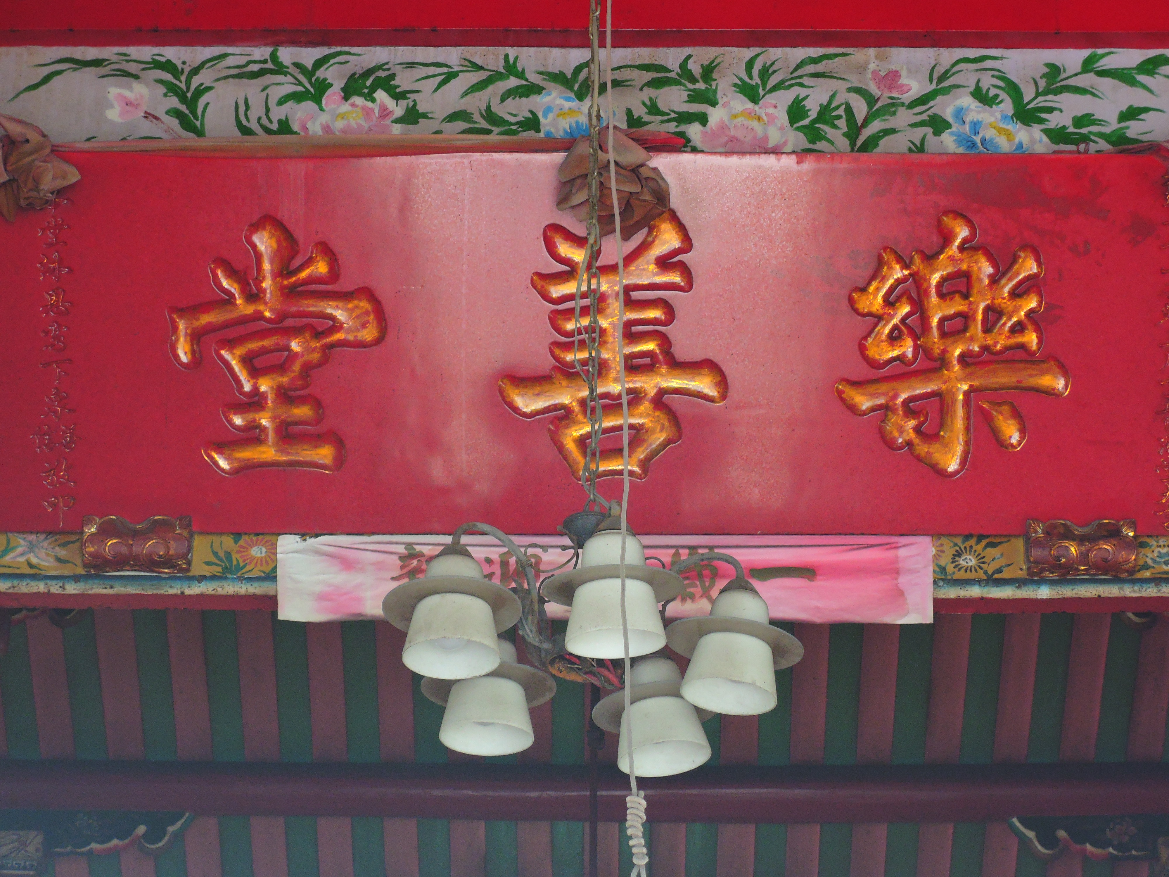 文人學士集結一新社在1891年成立「樂善堂」，「善堂」鸞堂常用之名，即為利用一新結社的力量成立宗廟組織－「樂善堂」是也。